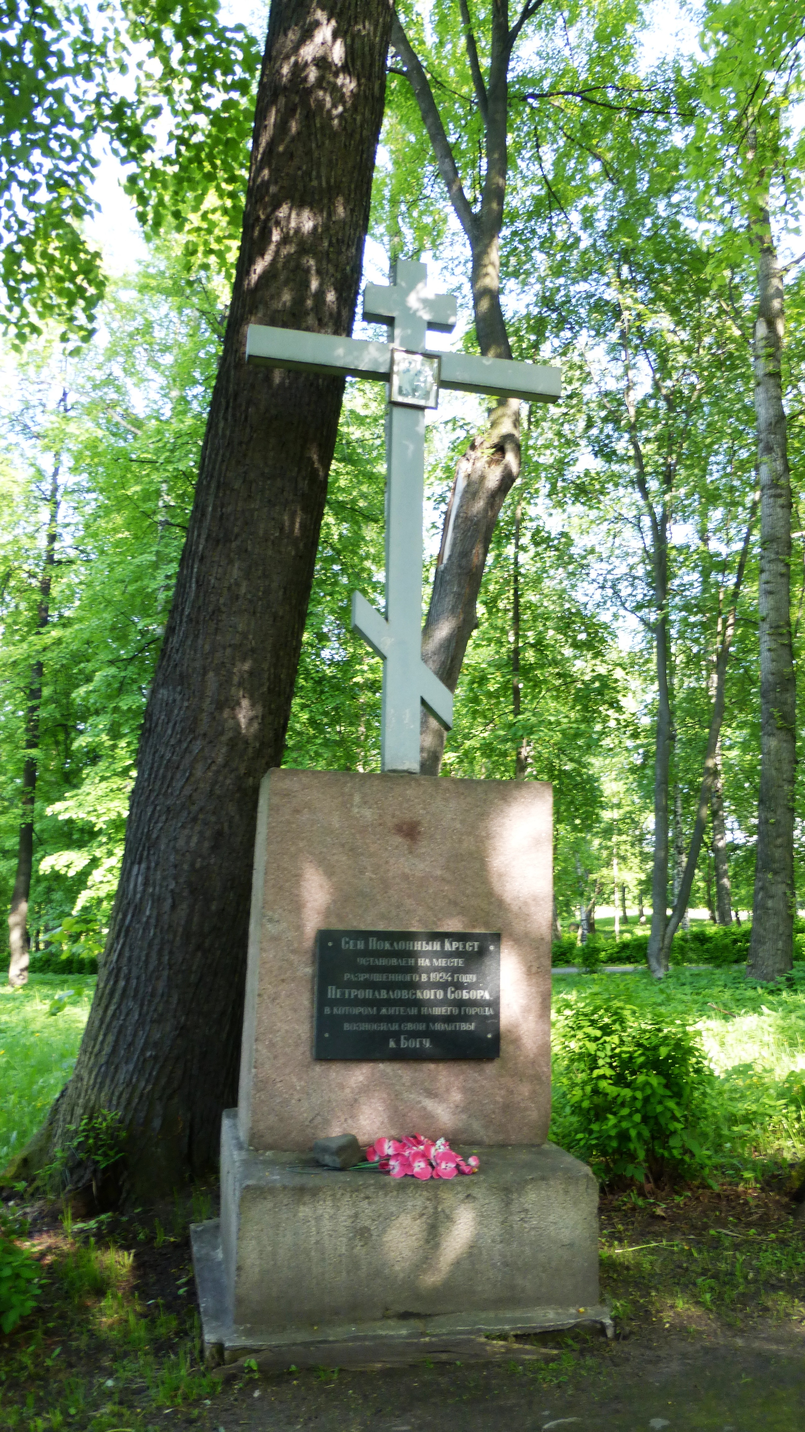 Поклонный крест. Установлен в 1996 году в парке культуры Петрозаводска на месте утраченного Петропавловского Собора.